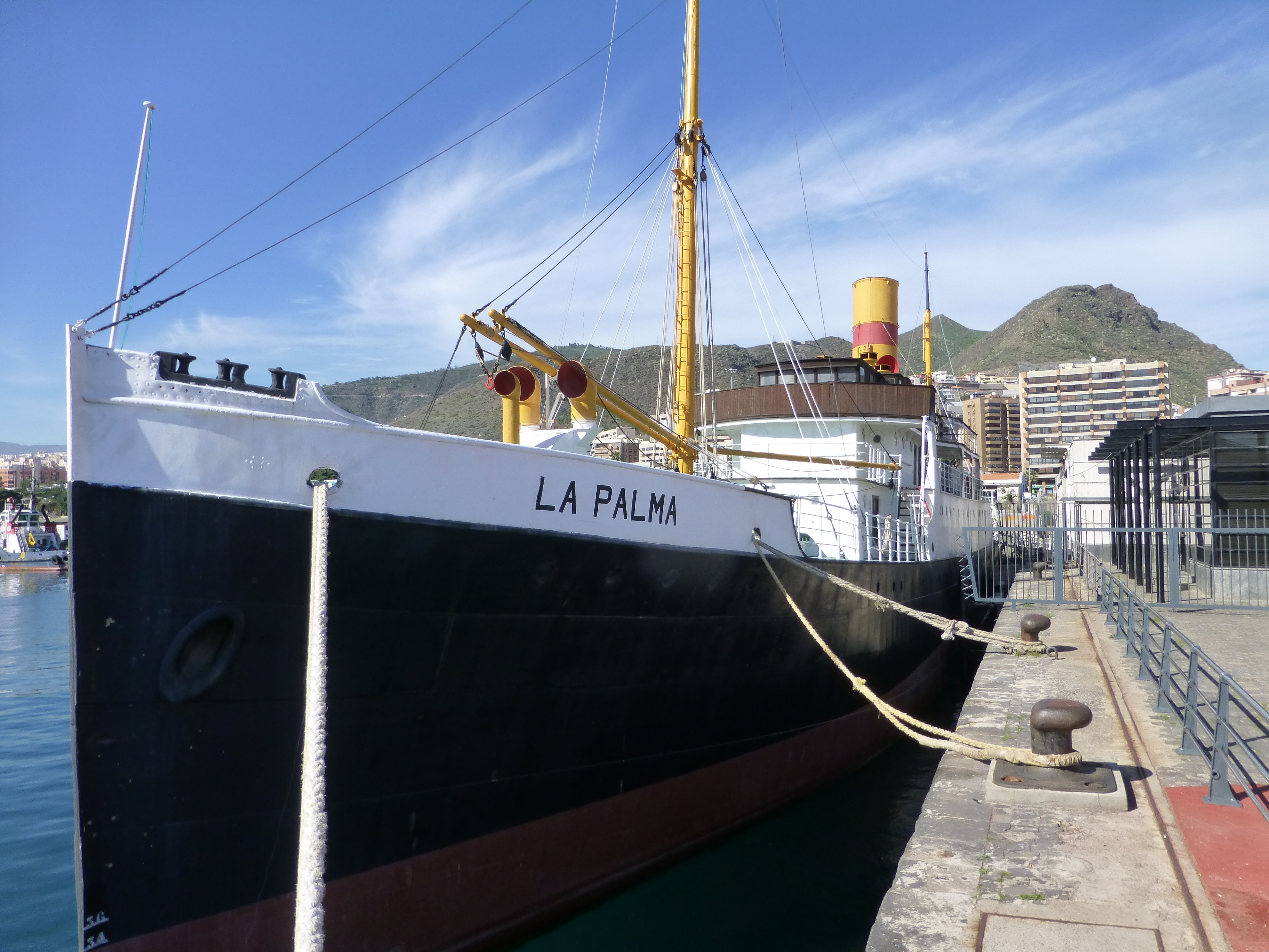 Vapor "La Palma", buque mixto de carga y pasaje, construido en el año 1912. Actualmente se conserva en el Muelle Norte del puerto de Santa Cruz de Tenerife (Canarias, España). Estuvo en servicio entre los años 1912 y 1976, navegando entre las islas del archipiélago canario. Hasta 1950 sus calderas consumieron carbón. En Canarias, se han conocido con el nombre de "correíllos" los distintos pequeños vapores que efectuaban comunicaciones interinsulares.